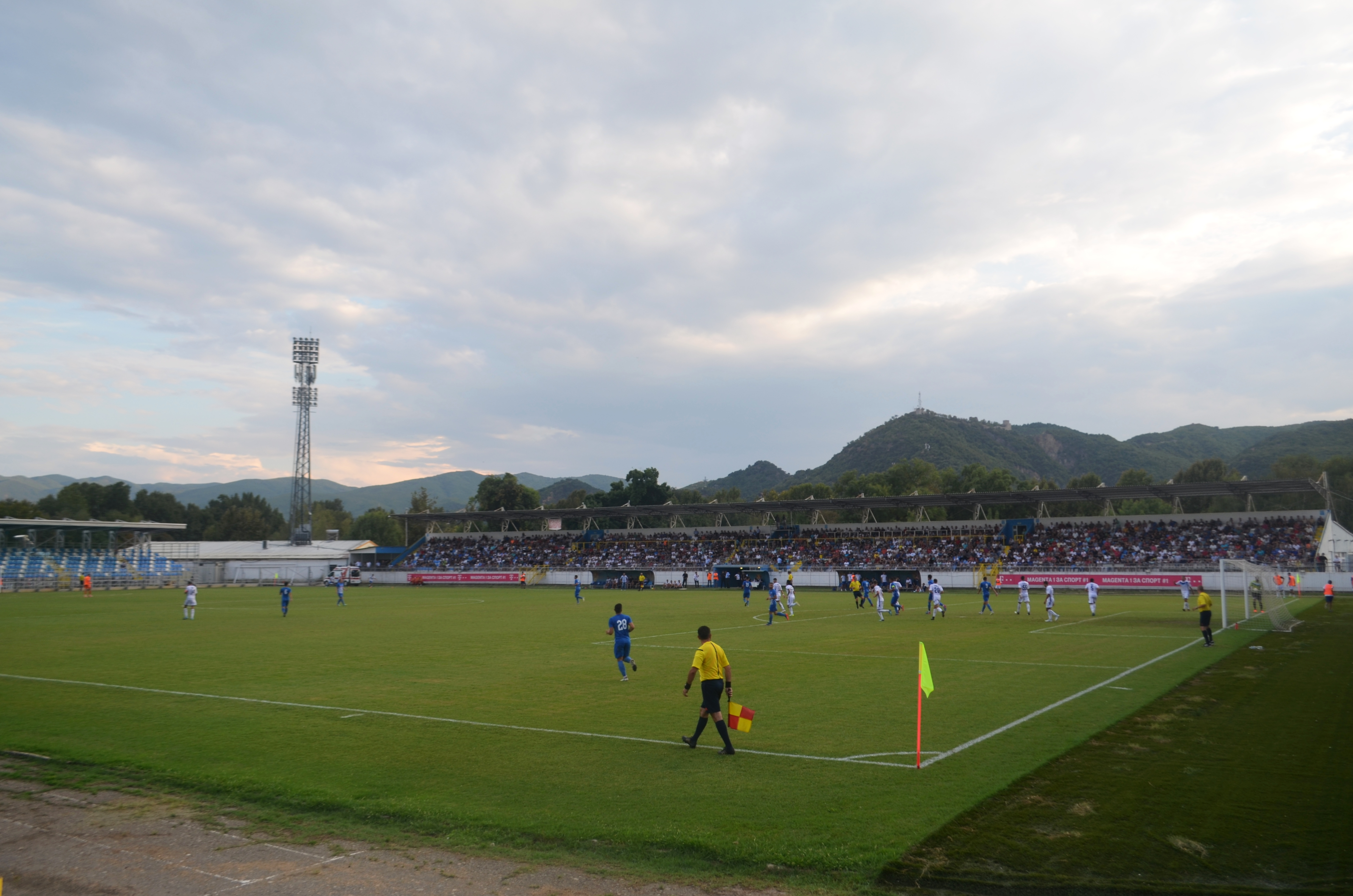 Натпревар од Првата македонска фудбалска лига меѓу струмичките клубови Беласица и Академија Пандев на стадионот „Младост“ во Струмица. Натпреварот се одигра во рамки на второто коло, а истиот го следеше публика од околу 4.000 гледачи. Играта заврши со резултат од 0:2 за Академија Пандев.